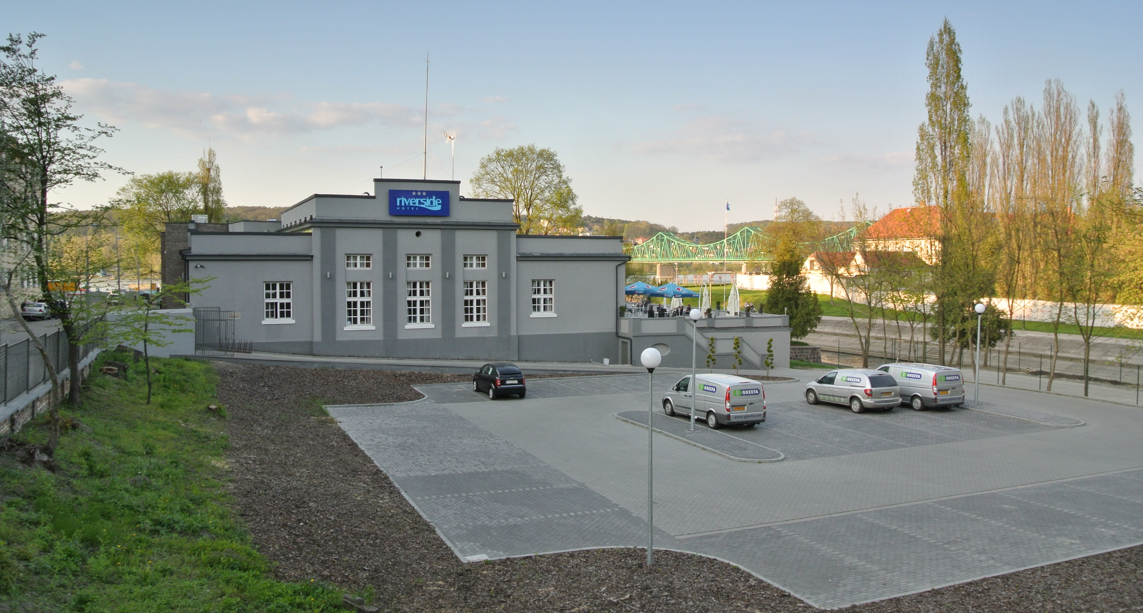 Dawny budynek reprezentacyjny Włocławskiego Towarzystwa Wioślarskiego (sprzedany)